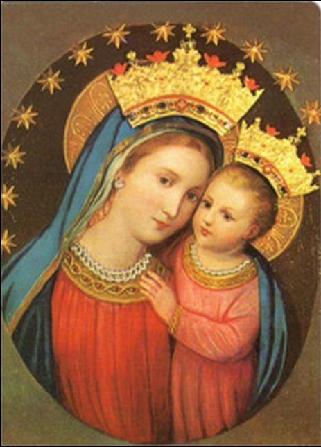 Immagine della Madonna che si venera in Santuario